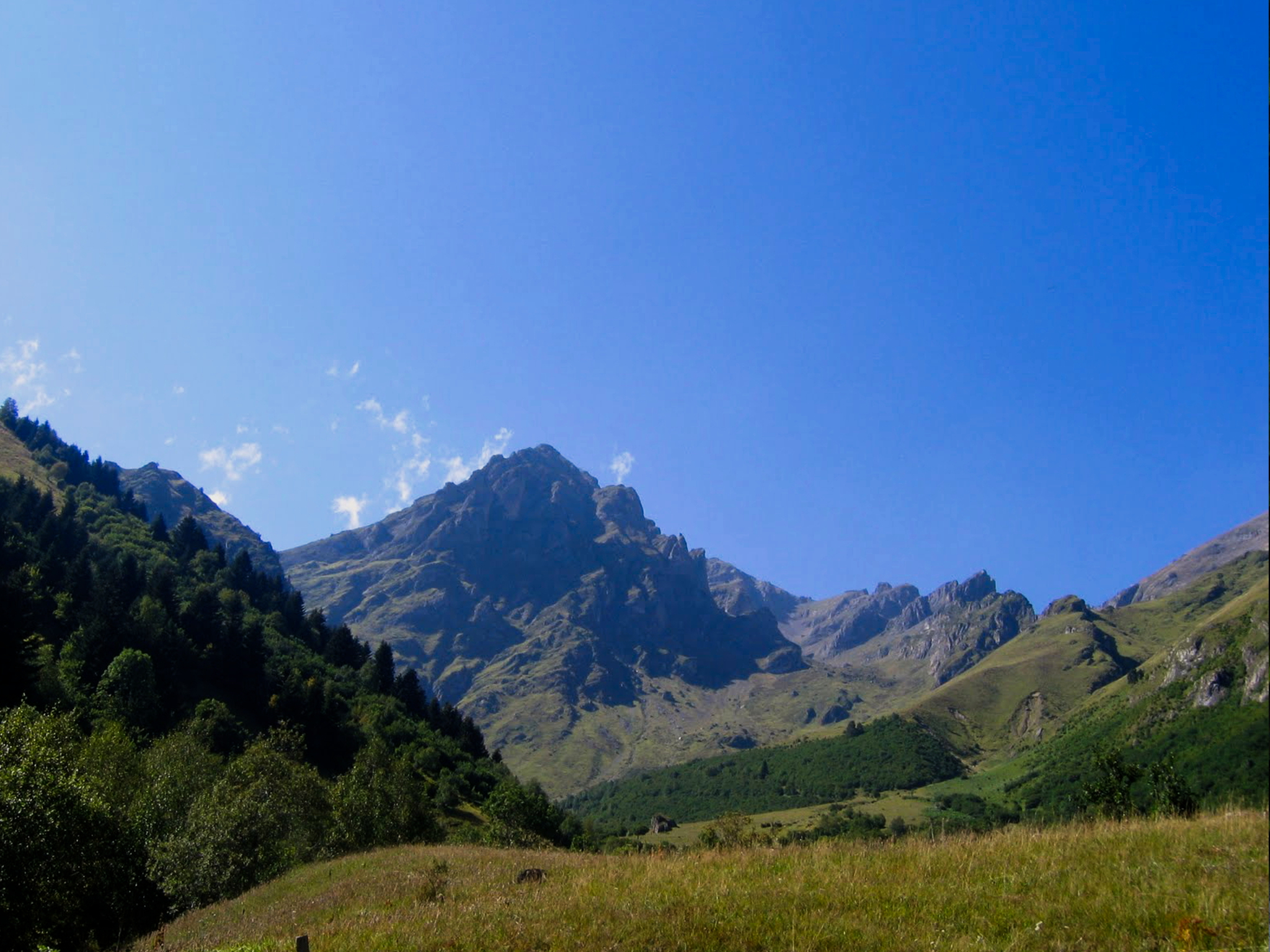 Mailh d'Aulon depuis les granges de Lurgues Réserve naturelle régionale d'Aulon vers Hautes-Pyrénées.- France